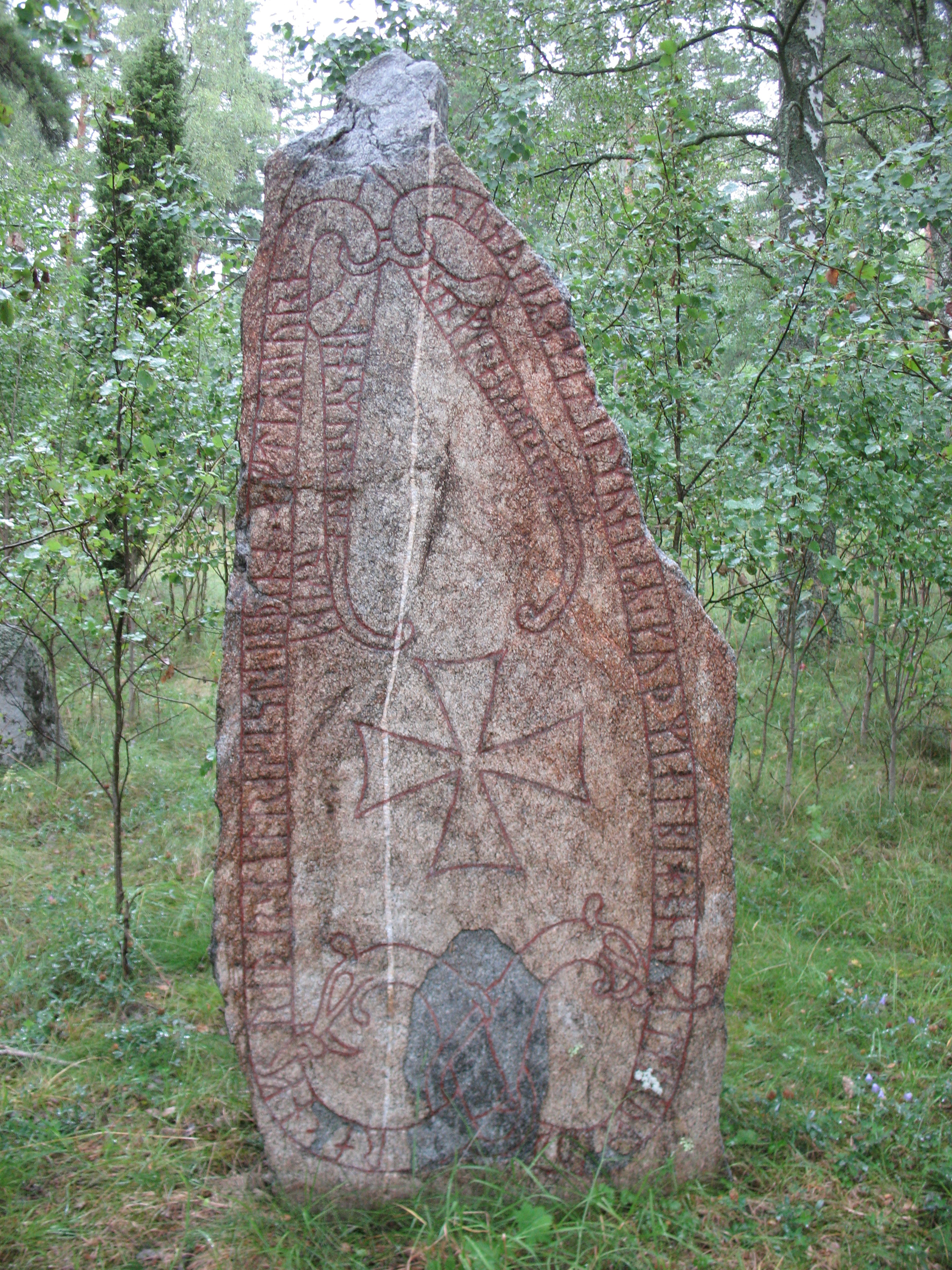 Runstenen U 356 i Ängby, Lunda socken, Sigtuna kommun.